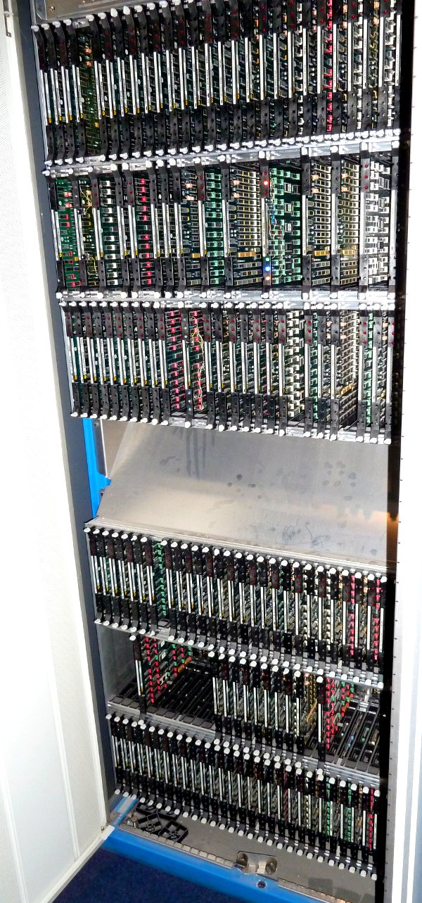 System 12 Schrank geöffnet